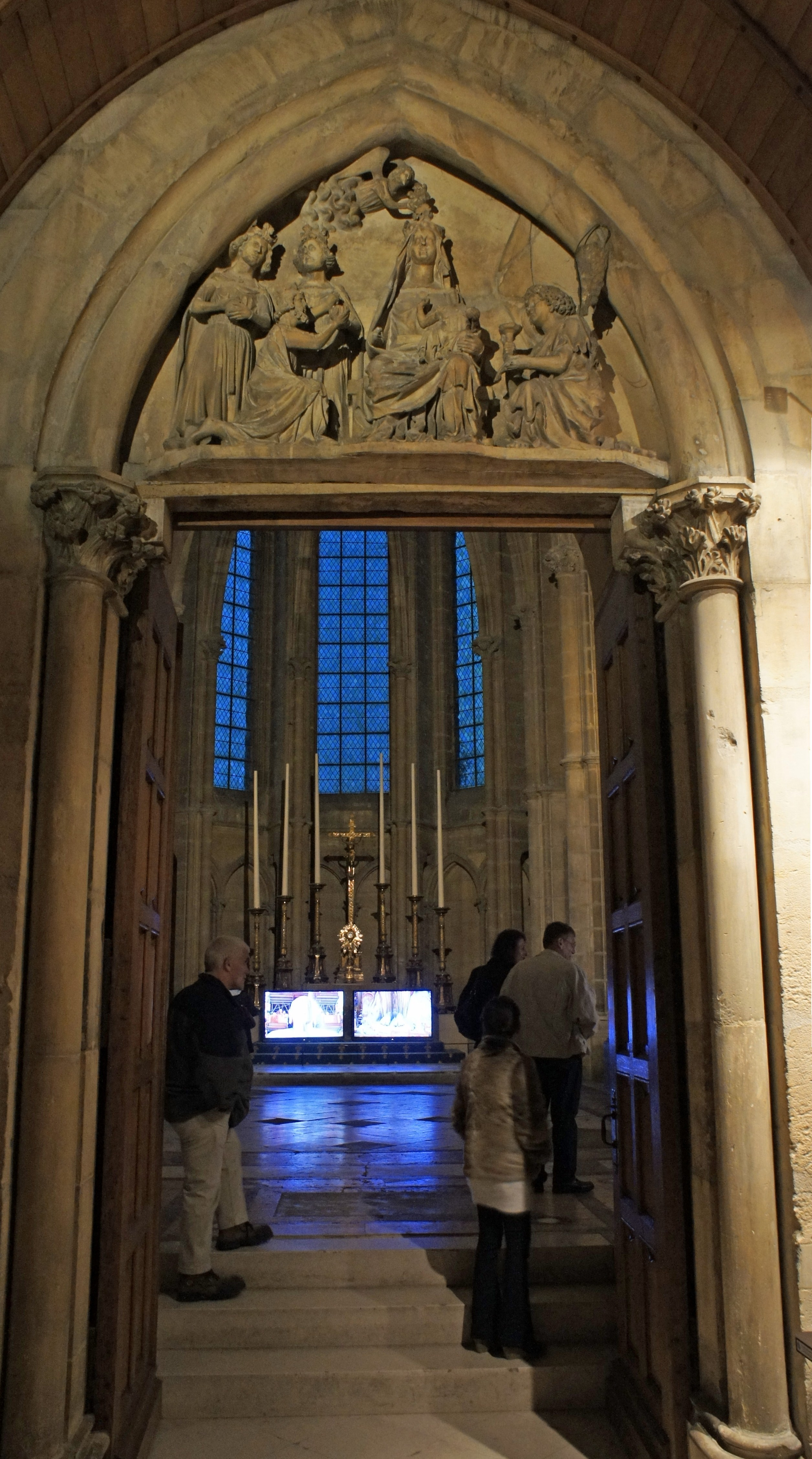 porche d'"entrée de la Chapelle palais du Tau avec son tympan.